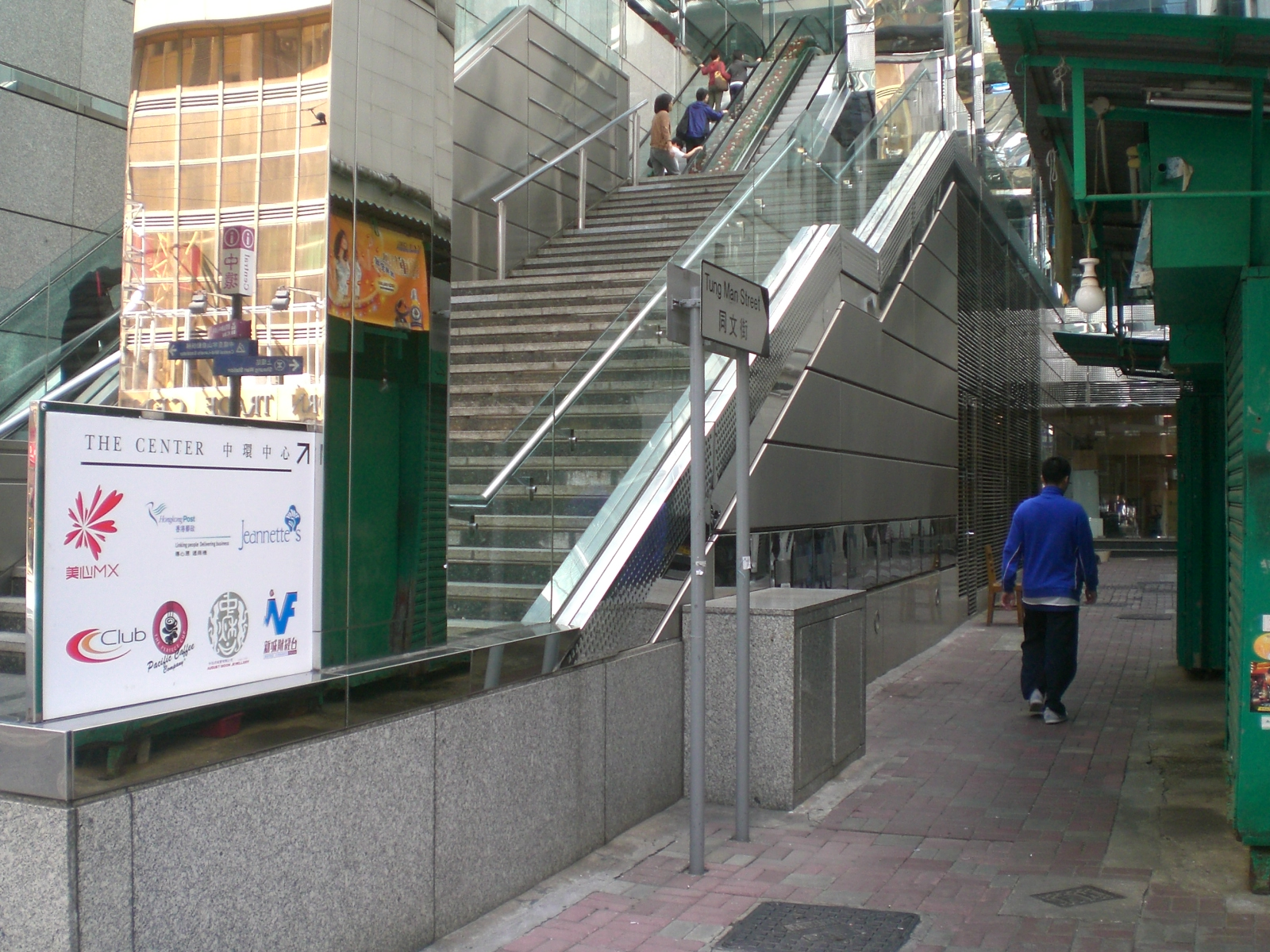 同文街近中環中心, 德輔道中, Central, Hong Kong